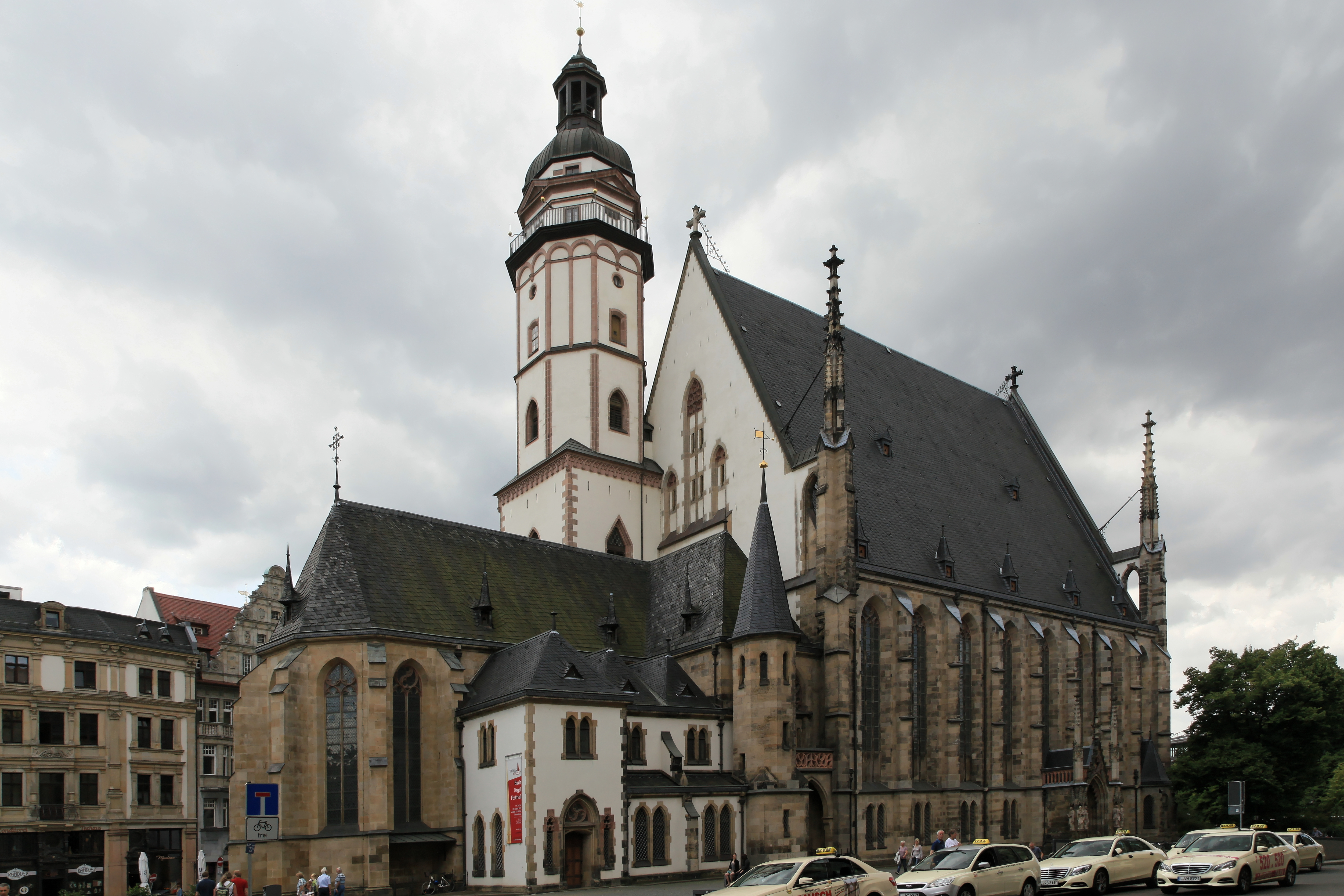 Thomaskirche, Thomaskirchhof in Leipzig